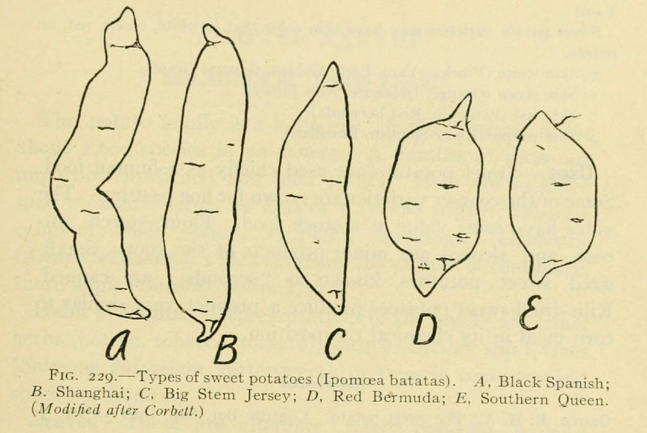 Morphologie des tubercules de Ipomoea batatas, extrait de Wilfred W. Robbins, The botany of crop plants; a text and reference book, Philadelphia, 1917, p. 557.